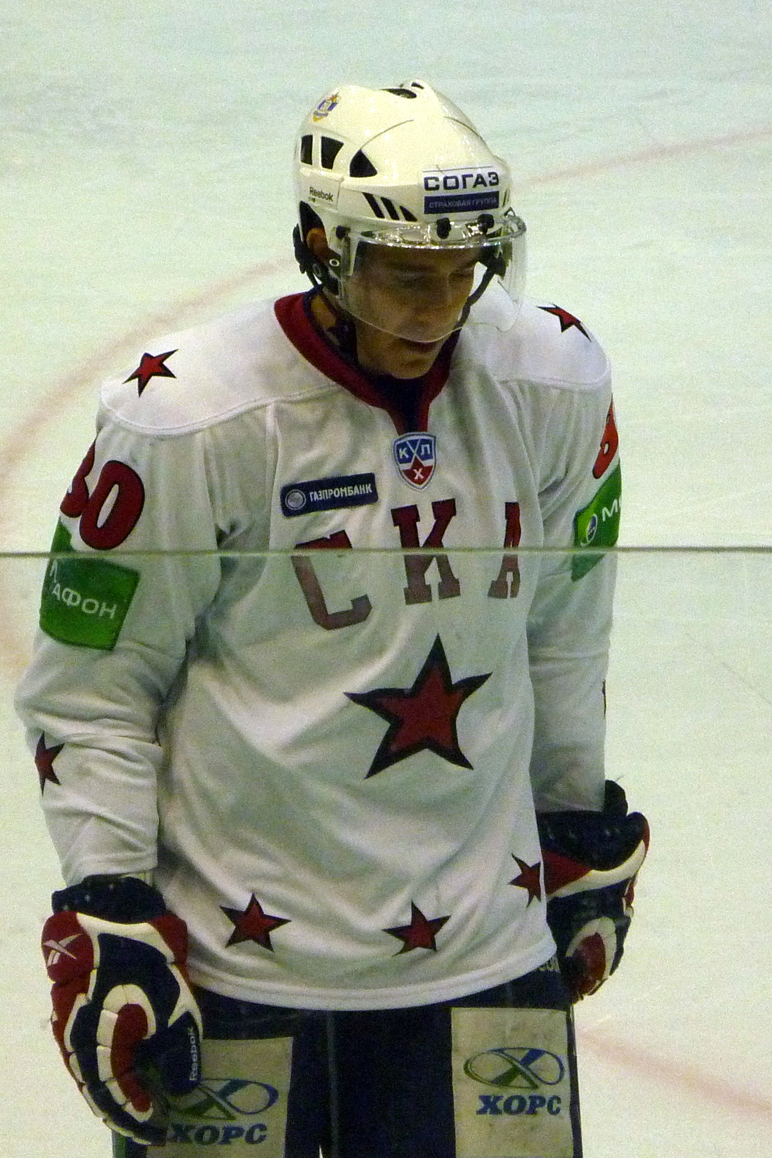 Нападающий питерского СКА Маттиас Вейнхандль в матче против нижегородского «Торпедо» 12 декабря 2010